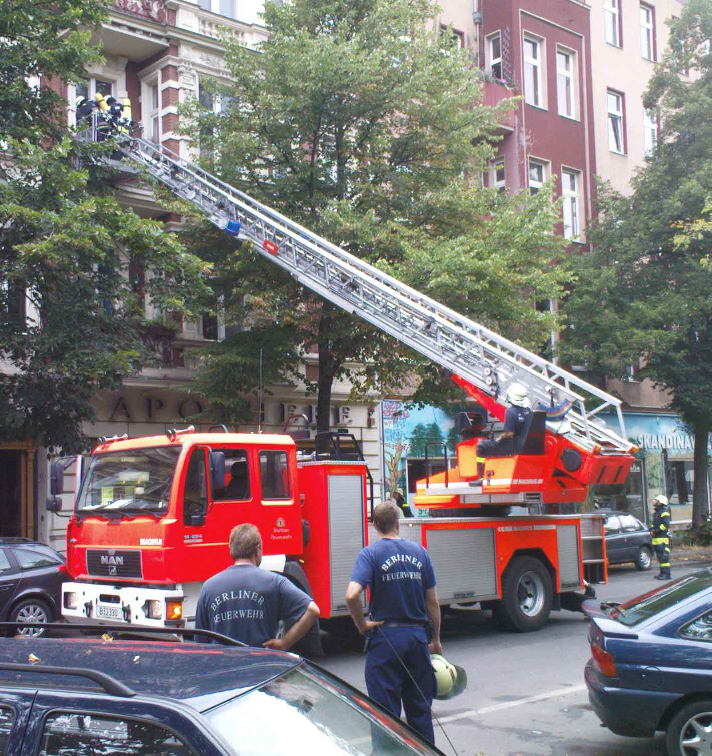 Löscharbeiten an einem Balkon im Berliner Stadtteil Kreuzberg. Magirus-Aufbau auf Fahrgestell MAN